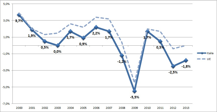 Crescita del PIL reale italiano a prezzi costanti dal 2000 in poi